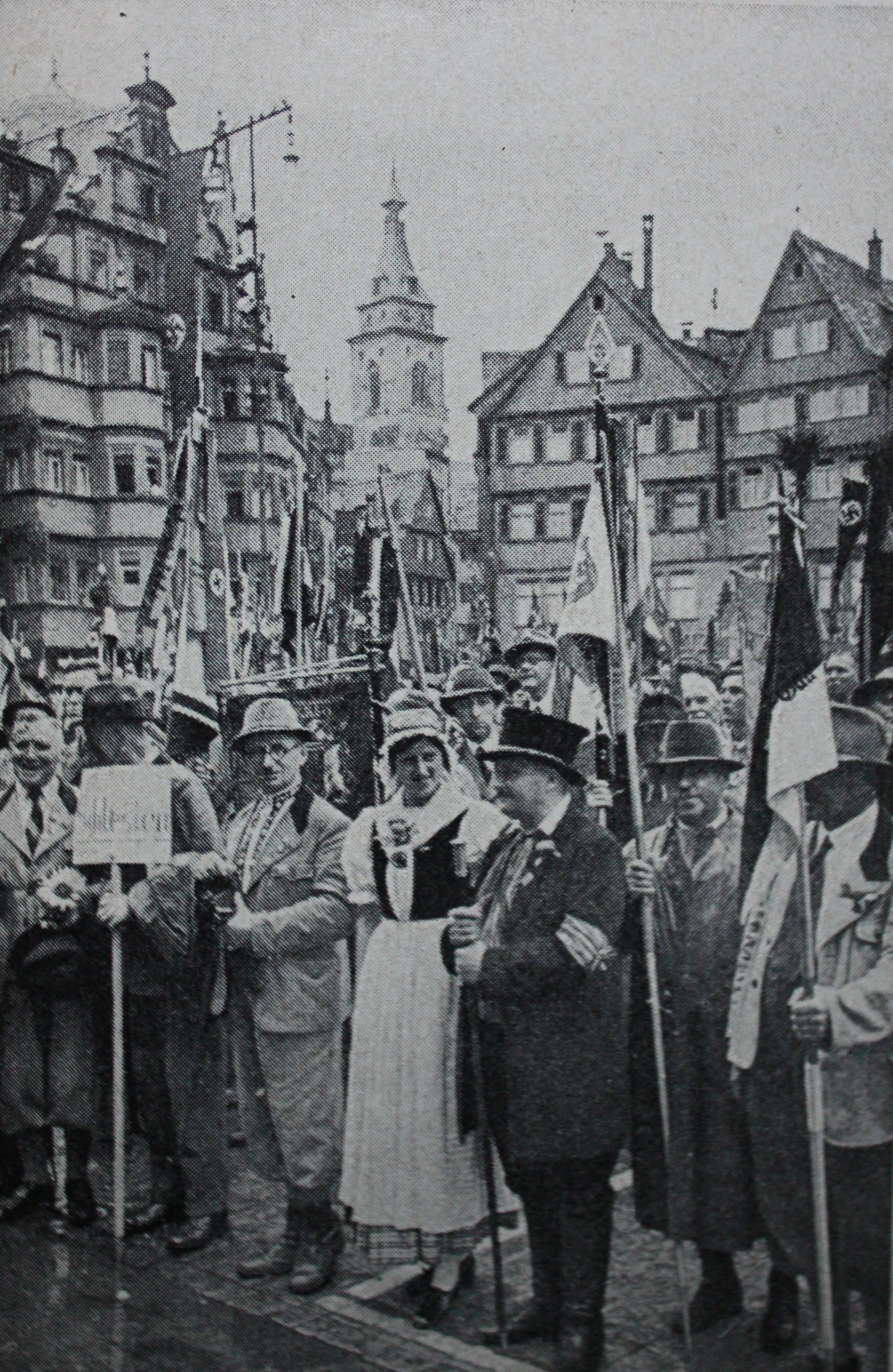 47. Deutscher Wandertag 1938 in Stuttgart. Kundgebung auf dem Stuttgarter Marktplatz. Originialbildbeschreibung: "Riesengebirgsverein und Albverein als gute Nachbarn"